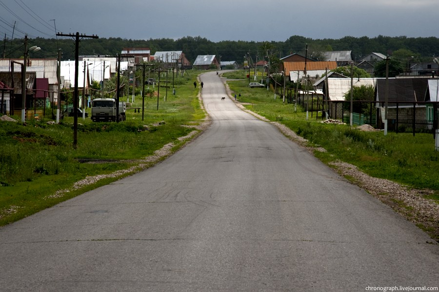 Общий вид на центральную улицу села Берёзовый Солонец, Ставропольский район Самарской области, Россия